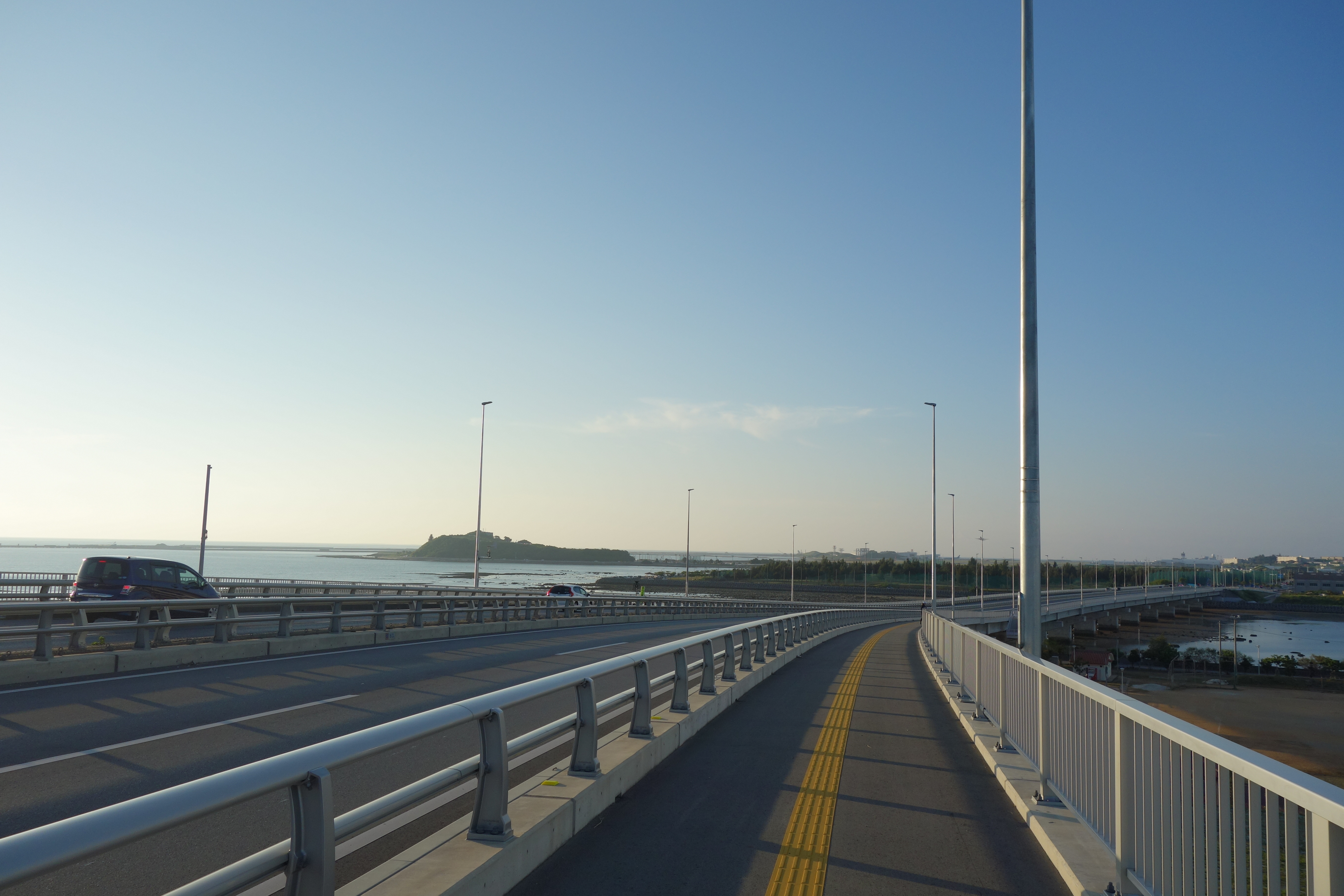 豊見城道路の眺め